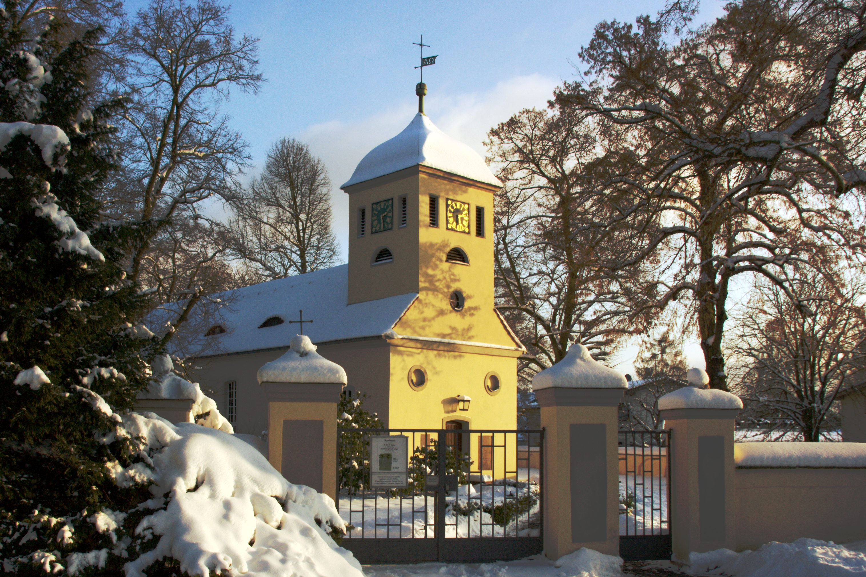 winterliche Dorfkirche von Kladow